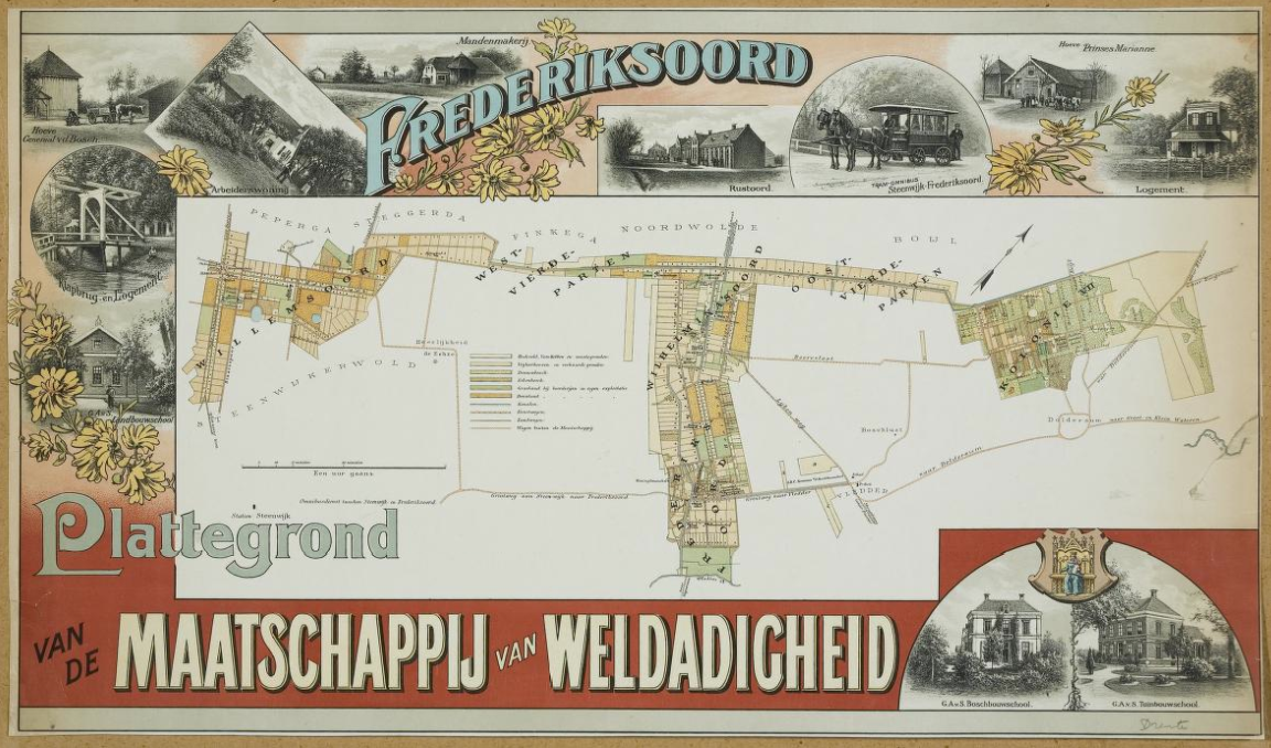 Plattegrond Maatschappij van Weldadigheid Willemsoord, Wilhelmianoord, Frederiksoord en kolonie VII